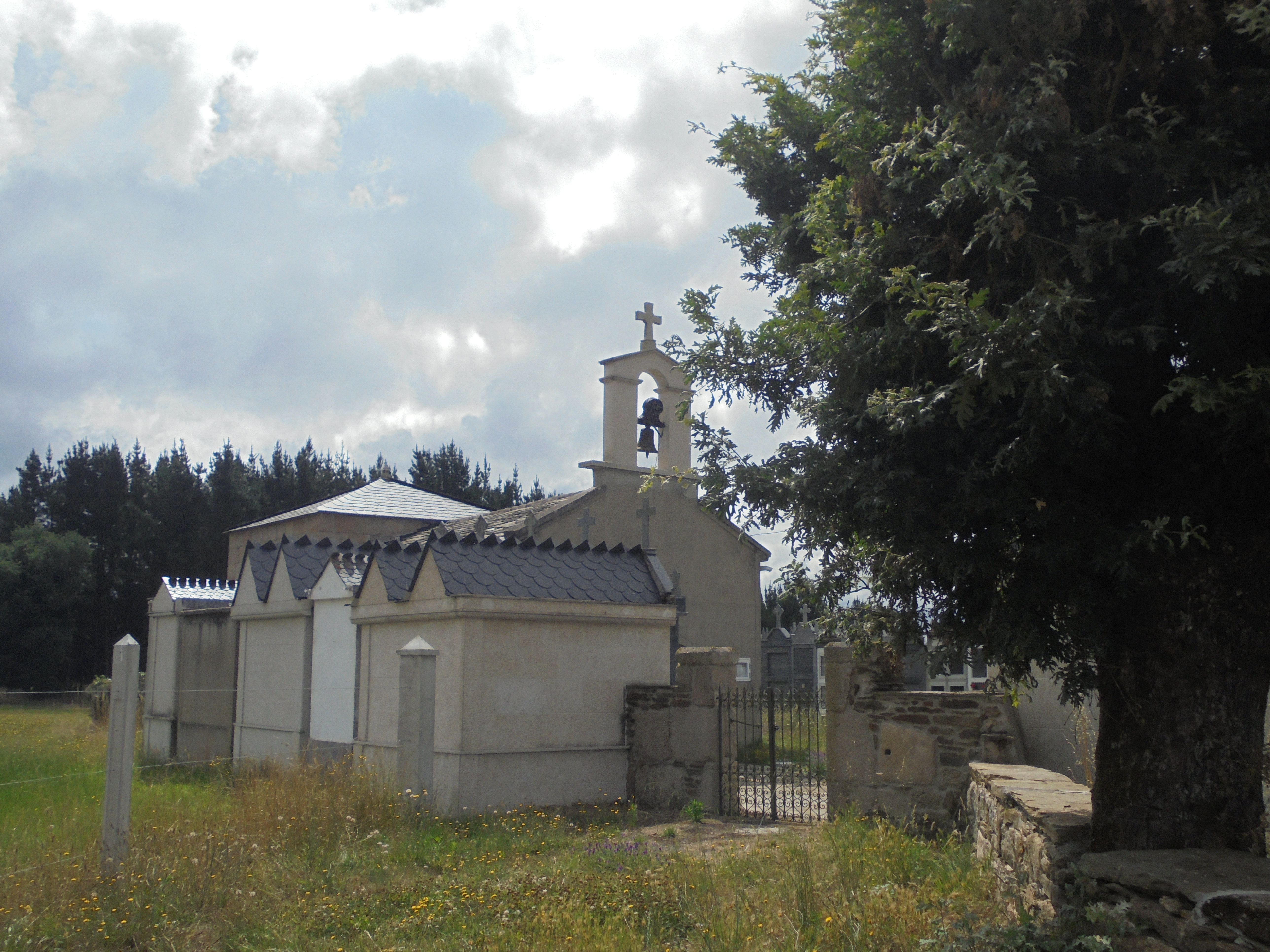 Igrexa de Sabarei ( O Corgo)